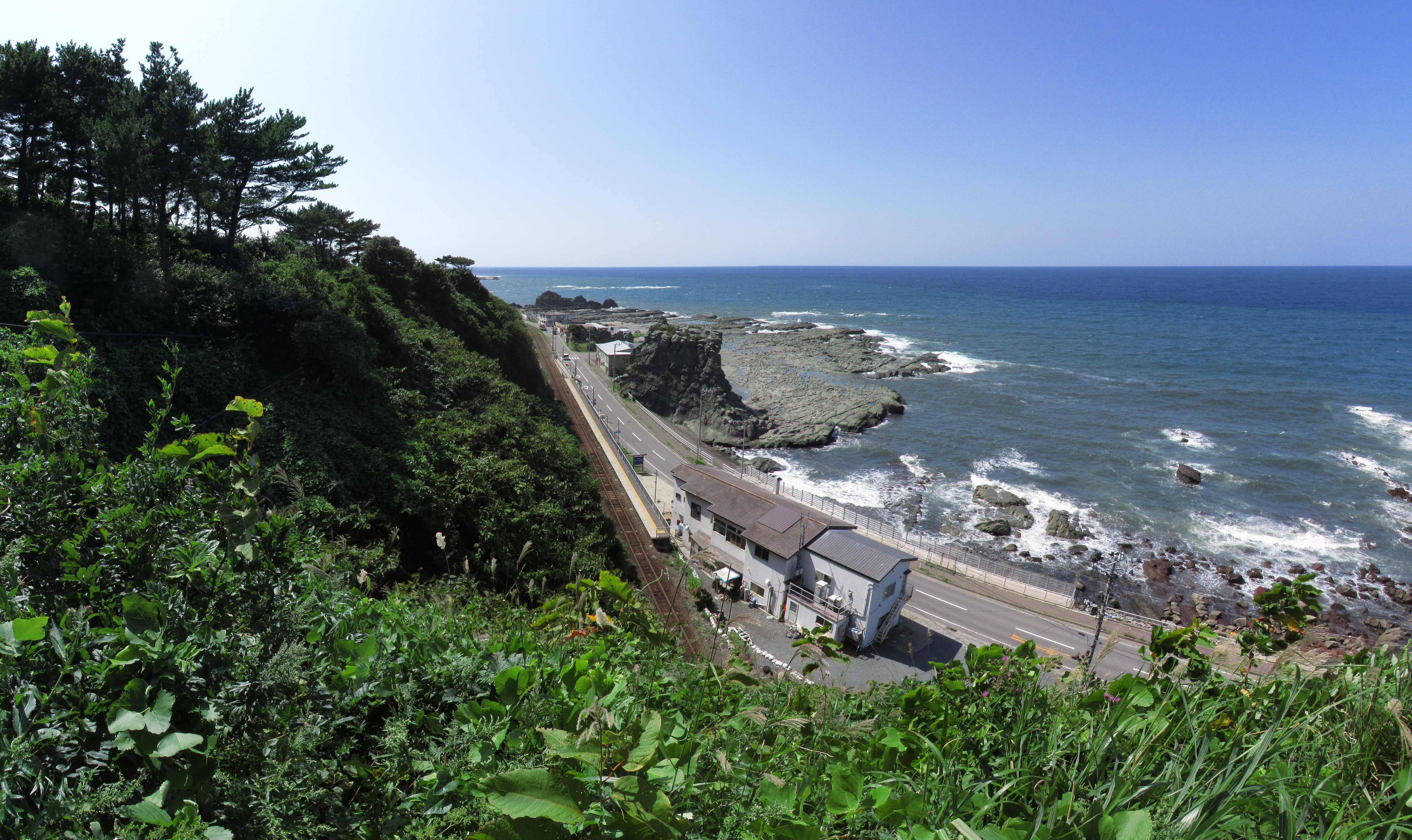 日本国,青森県,西津軽郡,深浦町,千畳敷,景勝地,Canon PowerShot SX170IS,13枚パノラマ合成写真,Microsoft ICE Ver.2,使用,日本の夕陽百選,海水浴場,撮影者：あおもりくま,Aomorikuma,Kumax_aomori